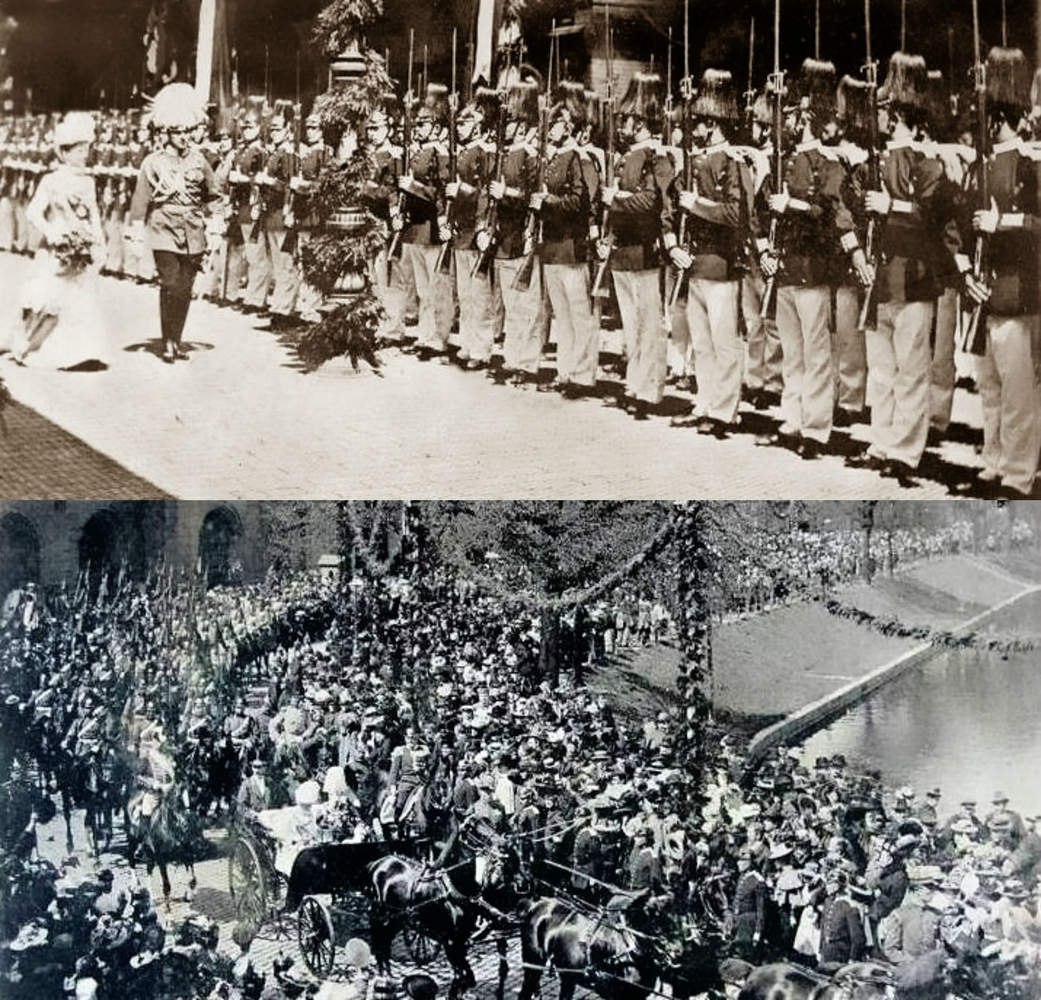 Ankunft und Einzug von Königin Wilhelmina der Niederlande und des Prinzen Heinrich der Niederlande in Schwerin am 9. Mai 1901.